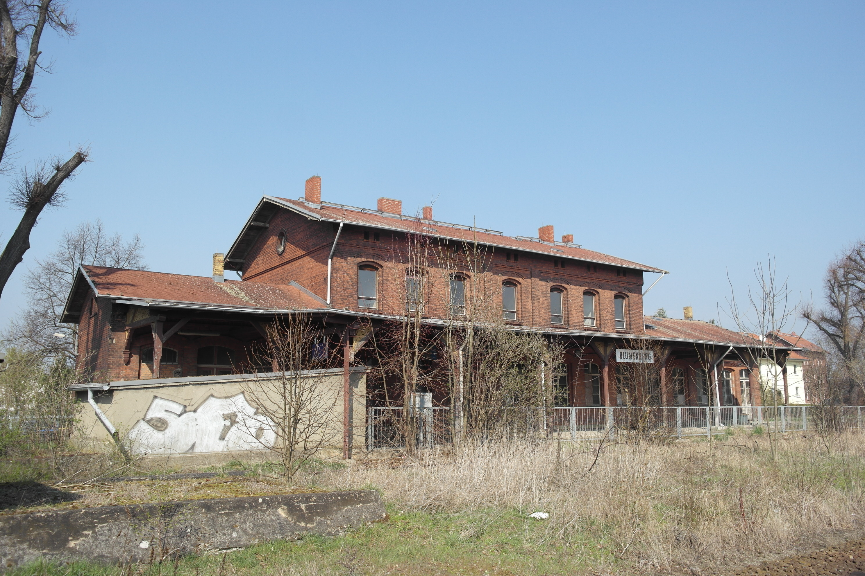 Bahnhof Blumenberg, Empfangsgebäude, Gleisseite